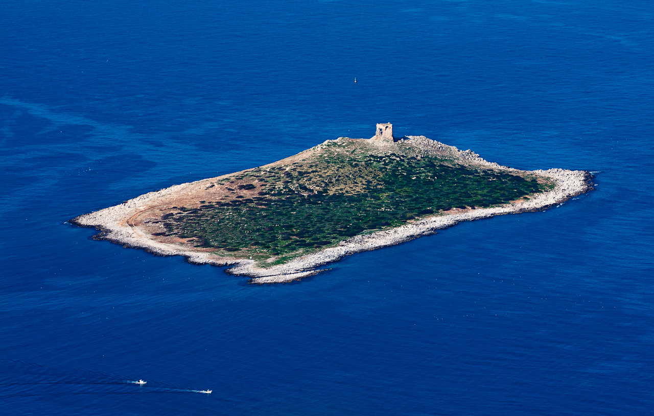 Veduta da Pizzo Monolfo Il luogo fotografato sulla mappa. [?]